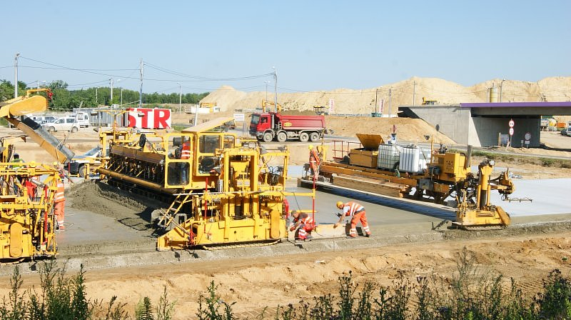 Budowa Autostrady A1 na odcinku Stryków - Tuszyn w okolicy ul. Brzezińskiej k/Łodzi. Układanie betonu nawierzchniowego.